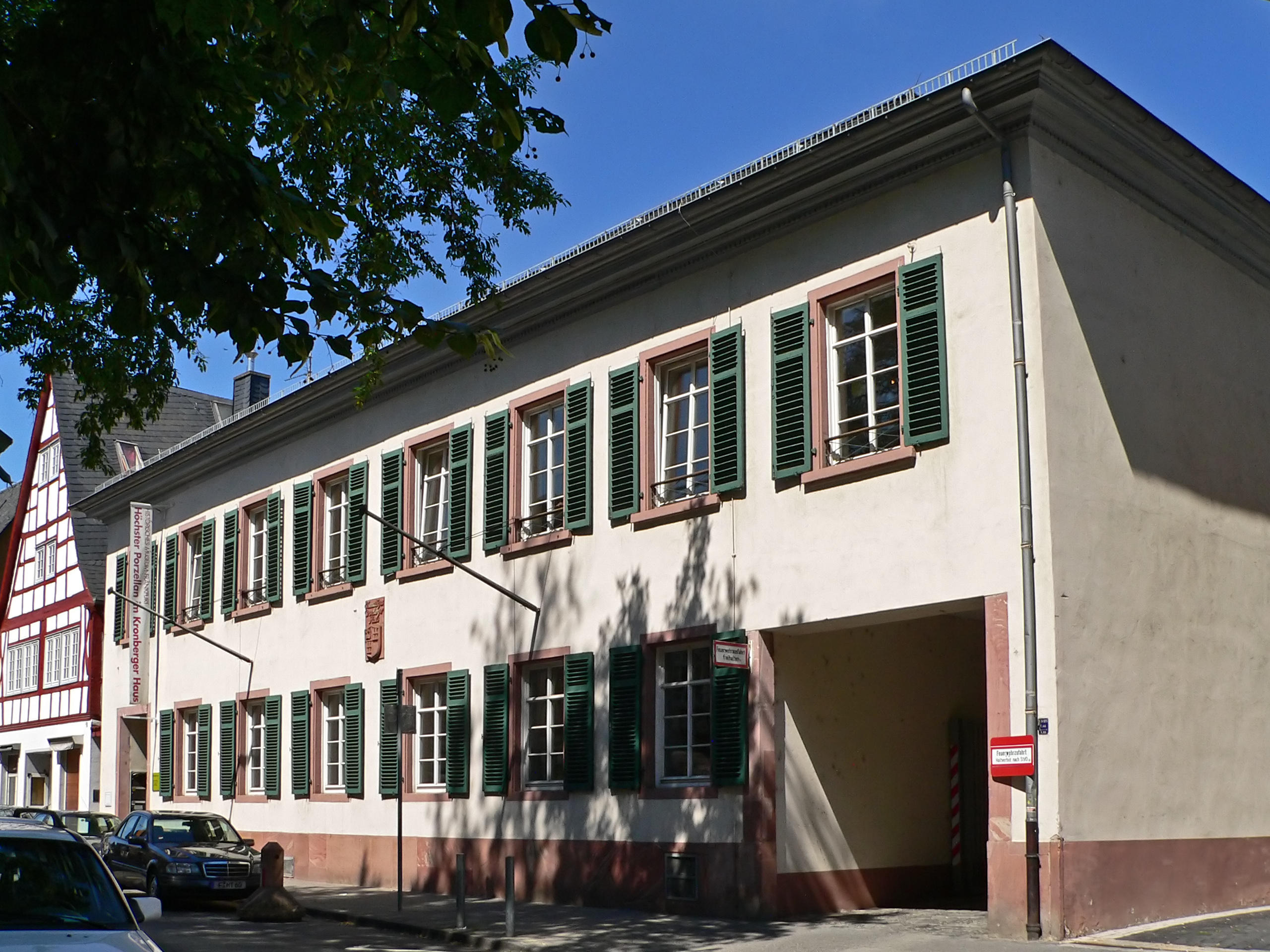 Das Kronberger Haus in Frankfurt Höchst, Bolongarostraße 152